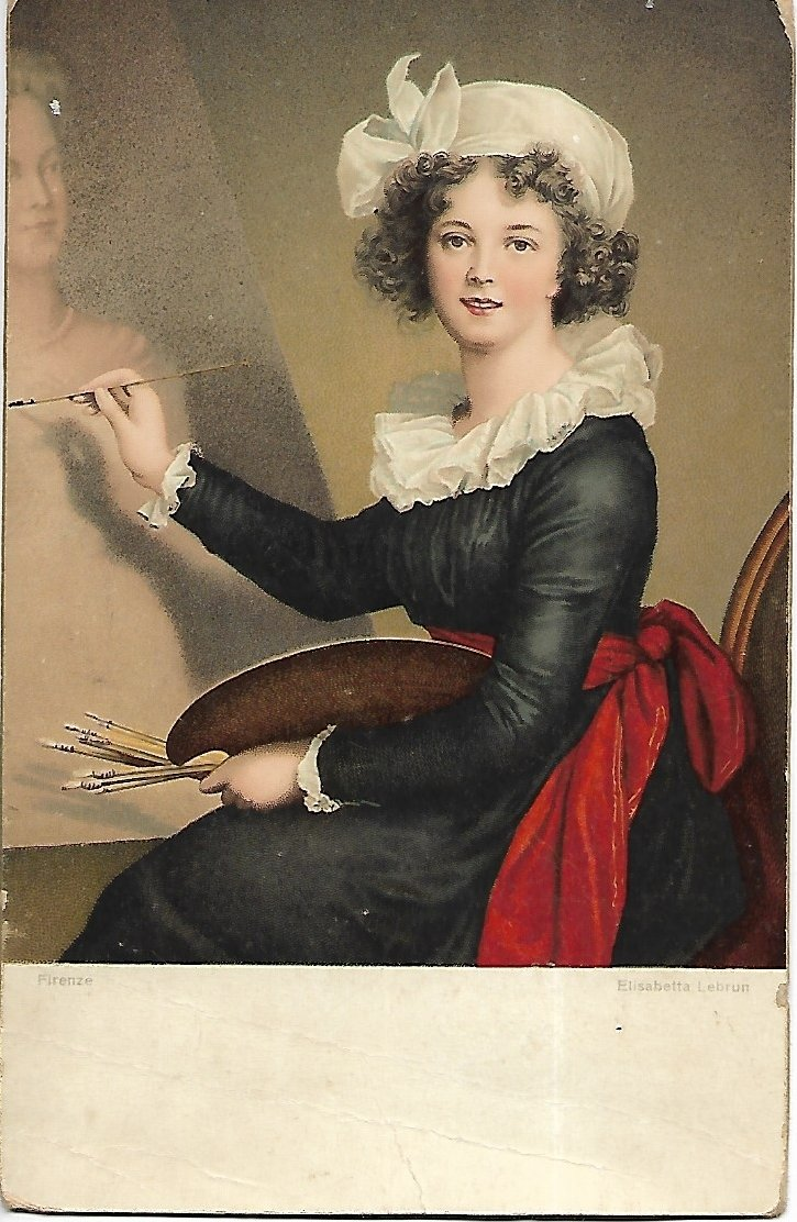 Elisabeth Vigée-Lebrun - autoritratto alla maniera di Maria Antonietta